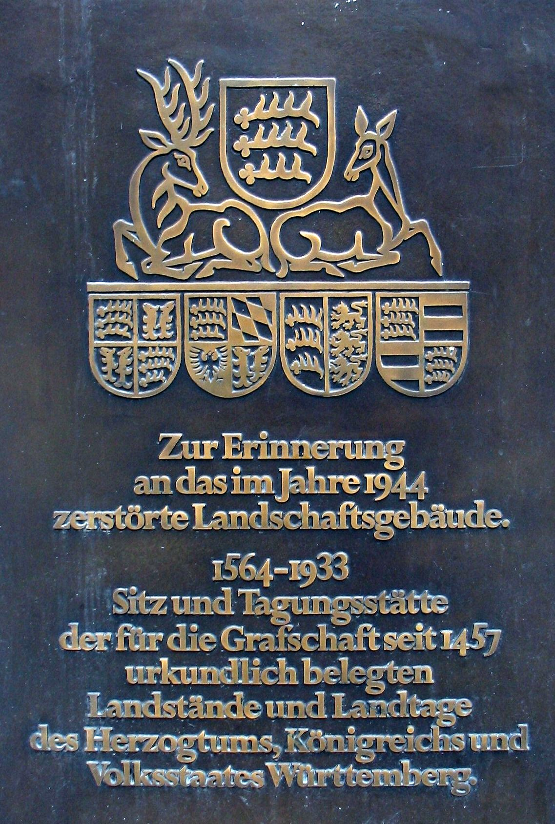 Erinnerungstafel an den Standort des alten württembergischen Landtagsgebäudes in der Kronprinzstraße in Stuttgart